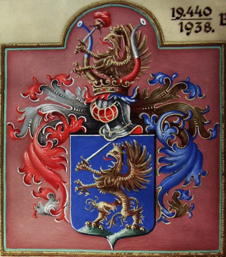 Belügyminisztériumi nemességigazolás